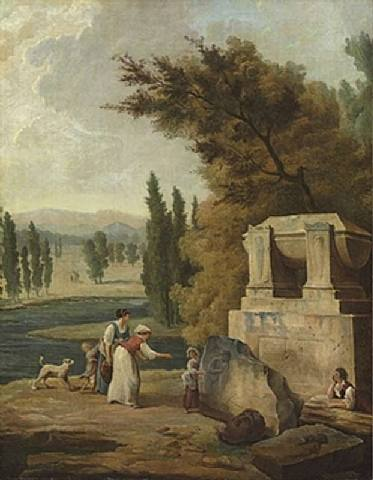 montre un projet pour le tombeau définitif de Jean-Jacques Rousseau qui n'a pas été réalisé.